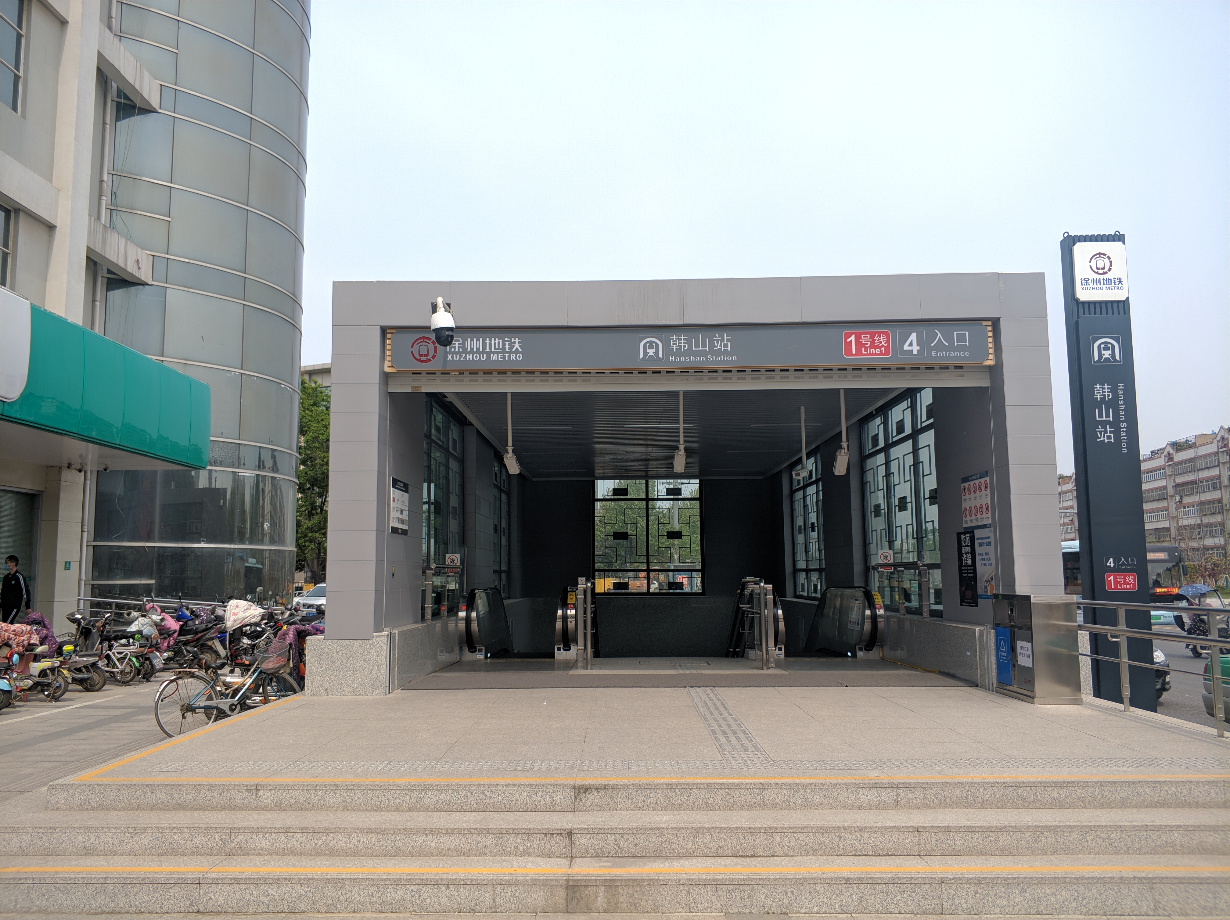 徐州地铁韩山站4号出入口